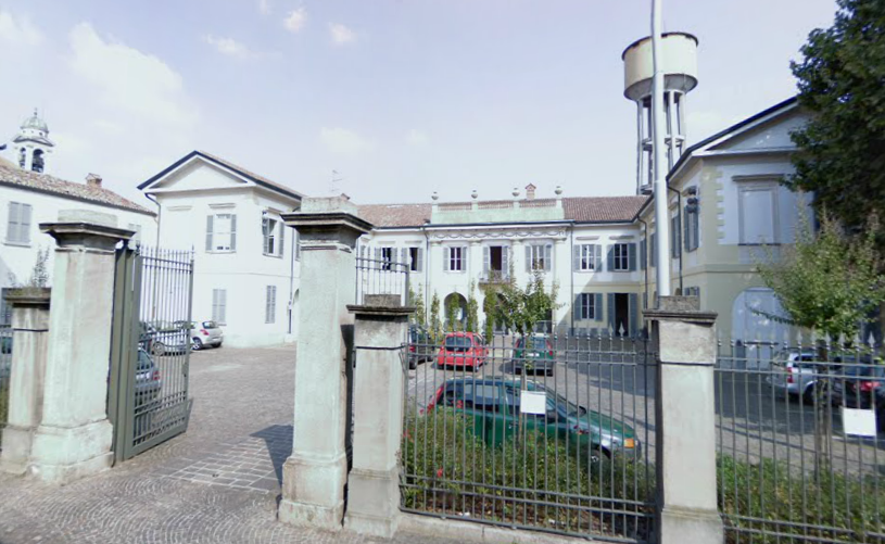 Palazzo Scotti a Robecco sul Naviglio (MI) - Italy